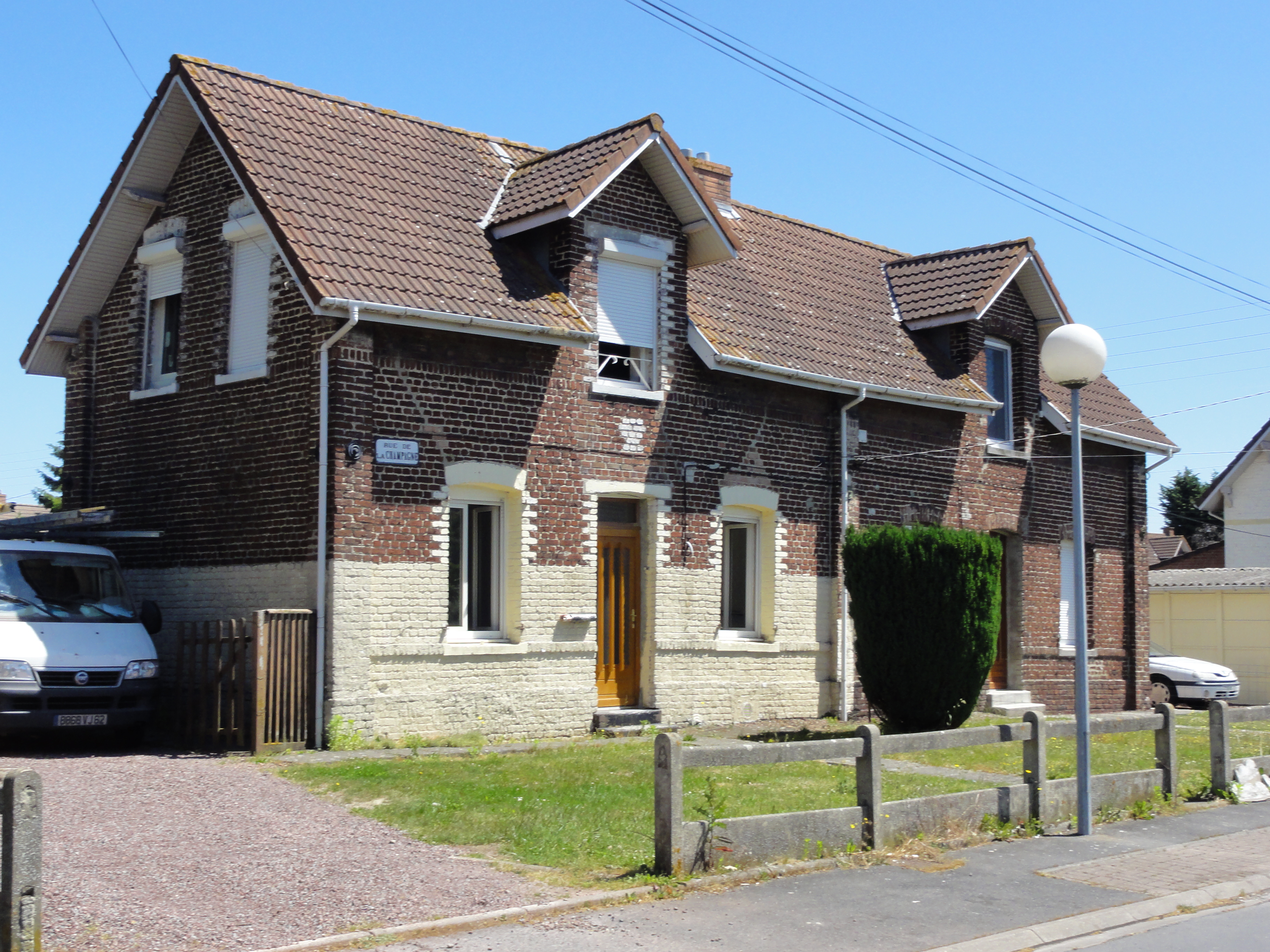 Cité no 5 de Béthune de la fosse no 5 - 5 bis de la Compagnie des mines de Béthune dans le bassin minier du Nord-Pas-de-Calais, Grenay et Loos-en-Gohelle, Pas-de-Calais, Nord-Pas-de-Calais, France. La cité no 5 de Béthune est en partie inscrite sur la liste du patrimoine mondial par l'Unesco le 30 juin 2012 et y constitue en partie le site no 84.